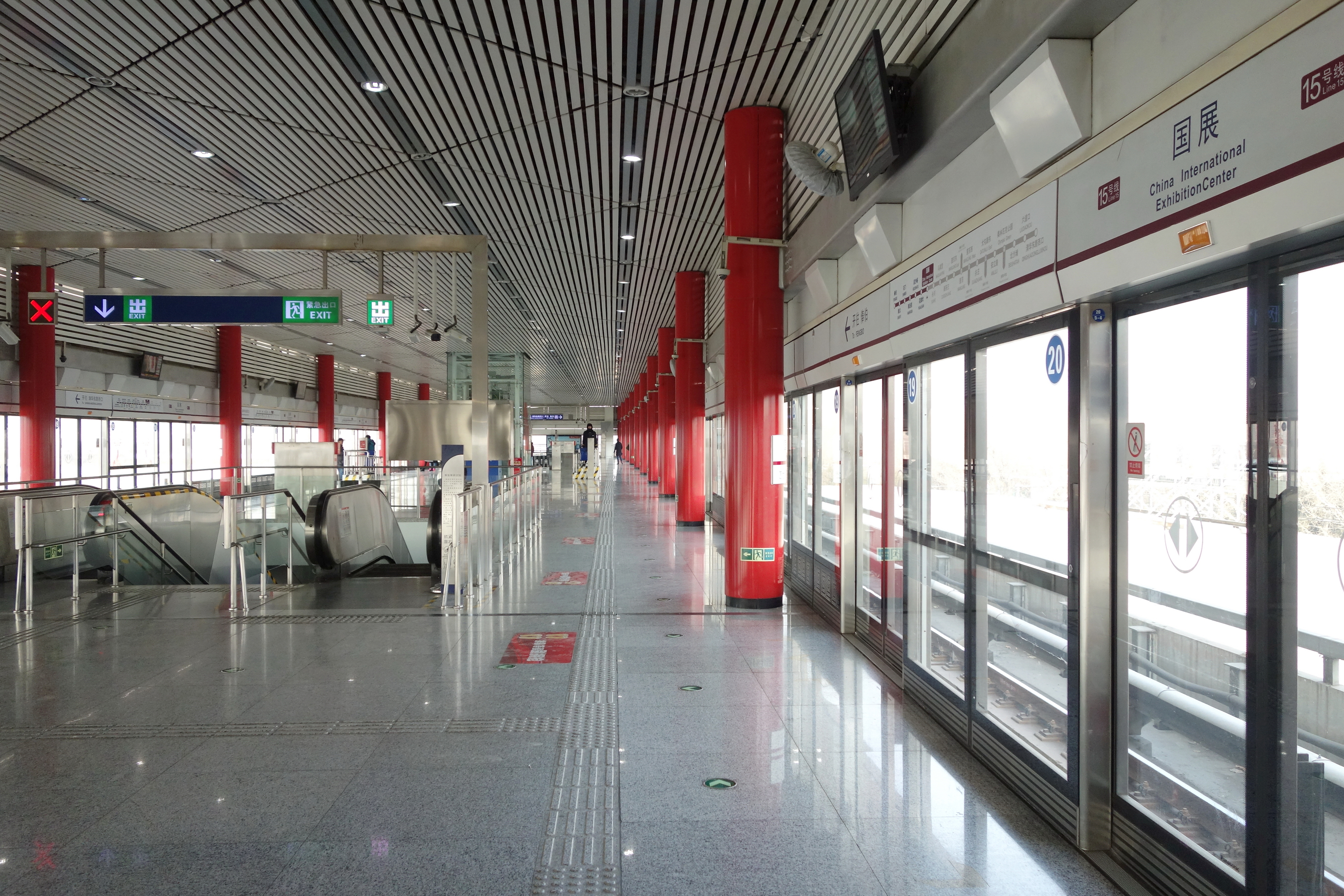 北京地铁15号线国展站站台